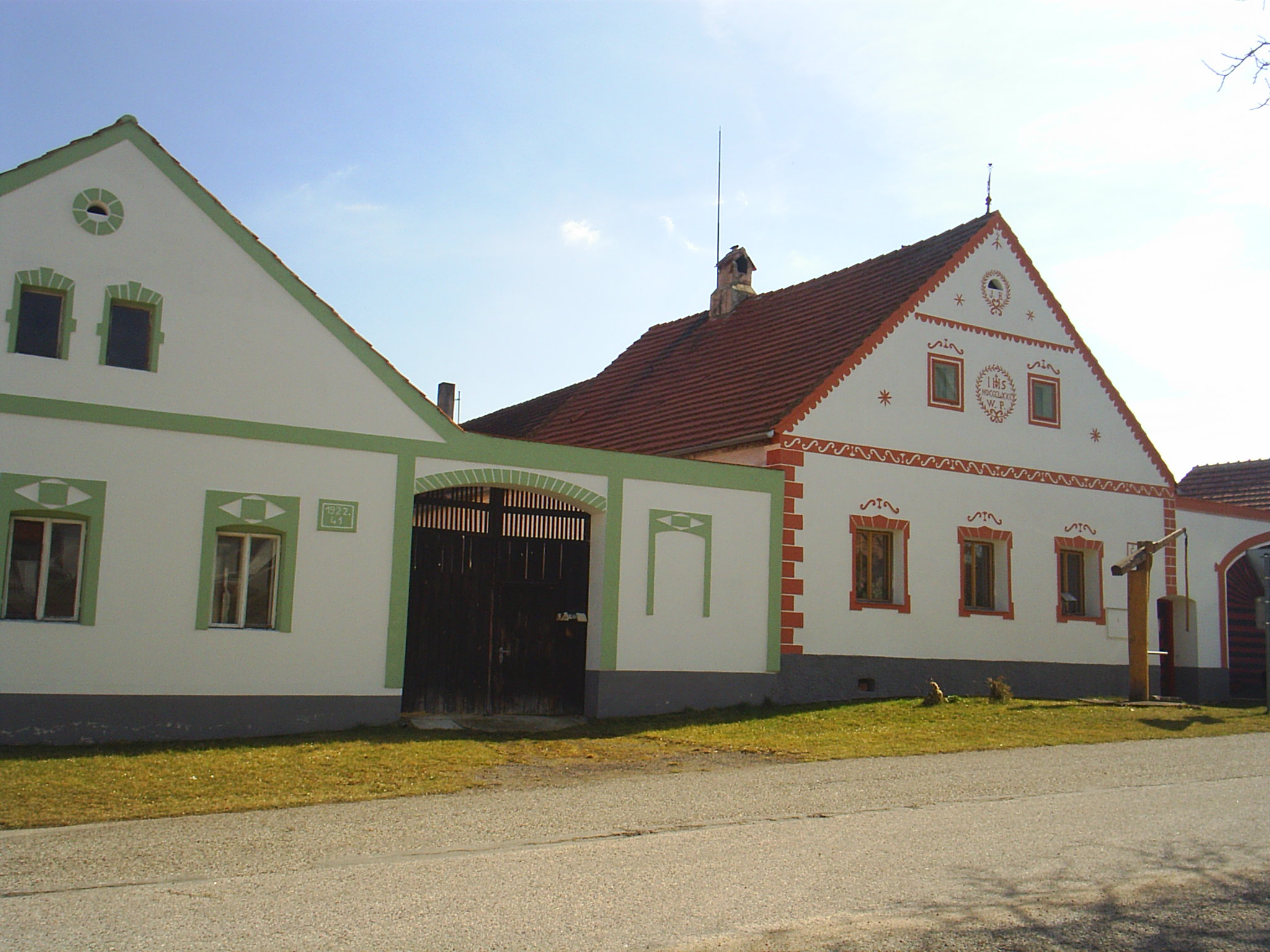 Holašovice-chráněná památka UNESCOEsperanto: Holašovice-protektata memorindaĵo de UNESCO